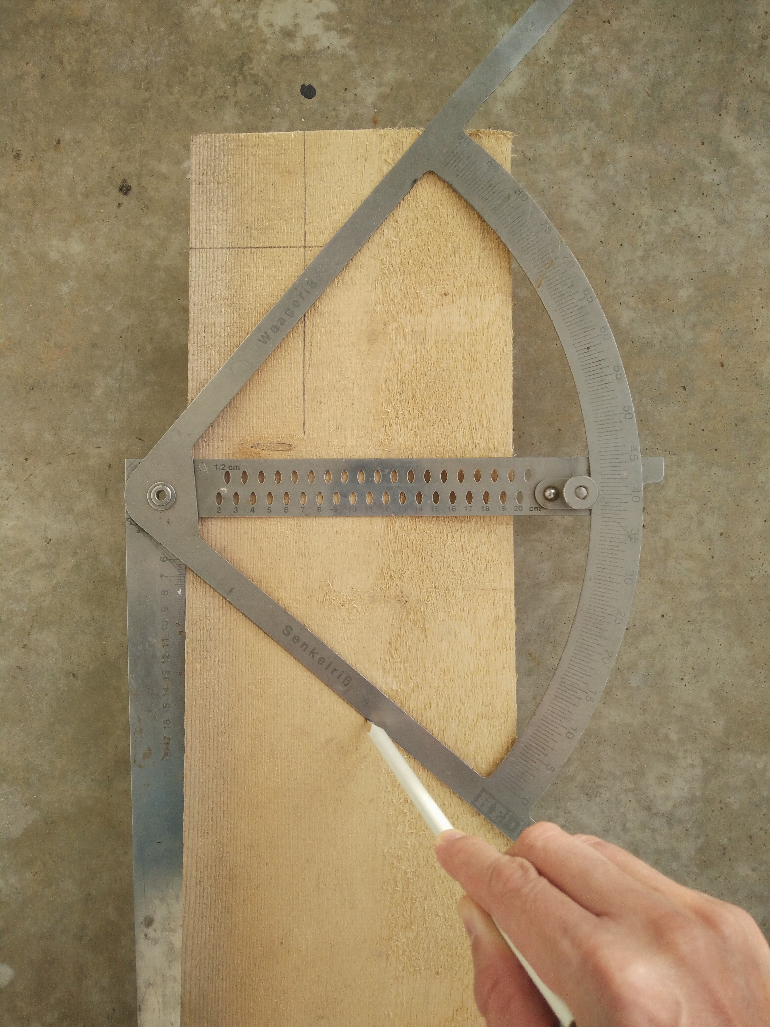 Alphawinkel mit Bleistift